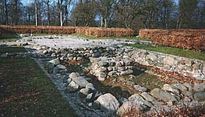 Ruiner af Skumstrup, det tidligere navn på herregården Vilhelmsborg, der nu ligger ved siden af